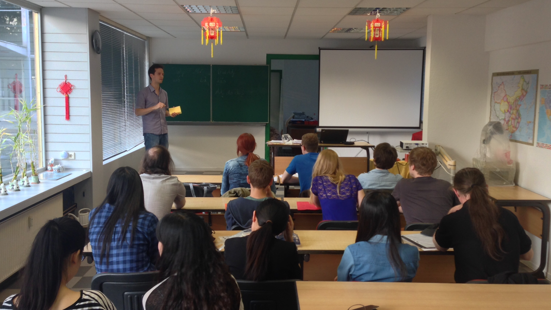 Sprachen- und Kulturwerkstatt im Kulturbahnhof Jena